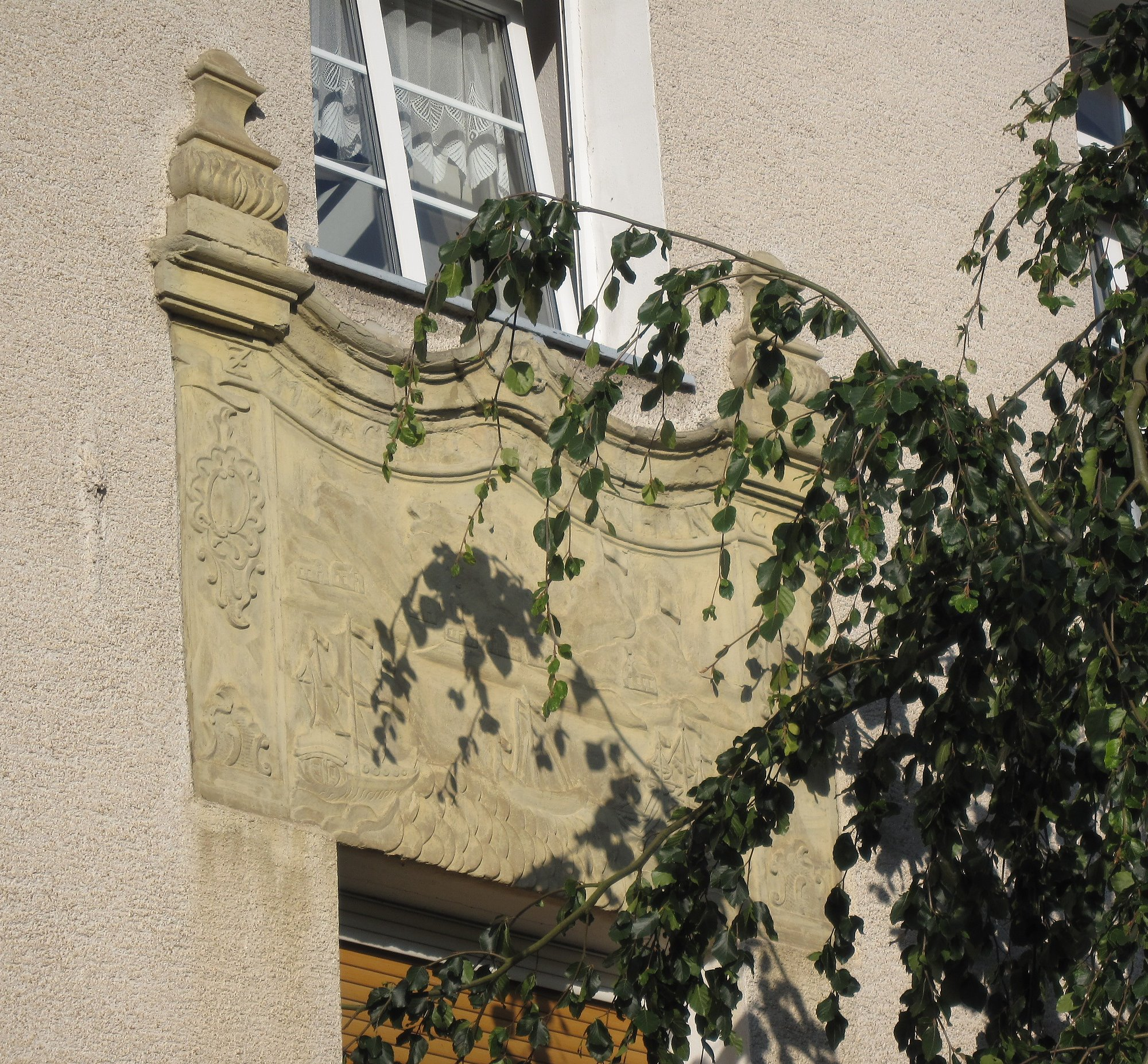 Steinrelief „Zum Vorgebirge der Guten Hoffnung“ aus dem Jahr 1771 am Patrizierhaus Stephanopel 61 in Hemer-Stephanopel. Denkmalgeschützt seit 2001.